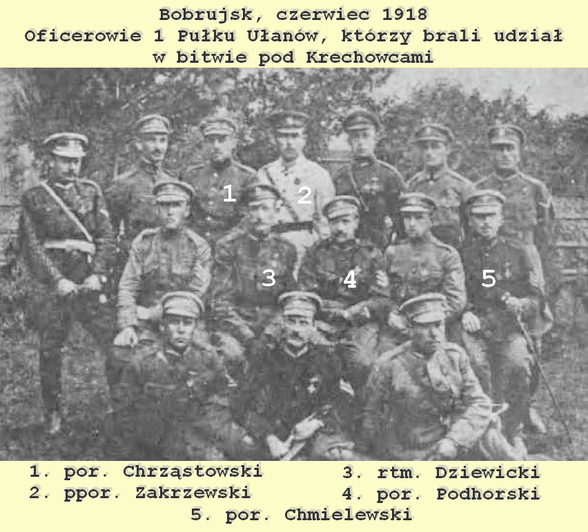 Oficerowie 1 Pułku Ułanów, którzy brali udział w bitwie pod Krechowcami (Bobrujsk, czerwiec 1918